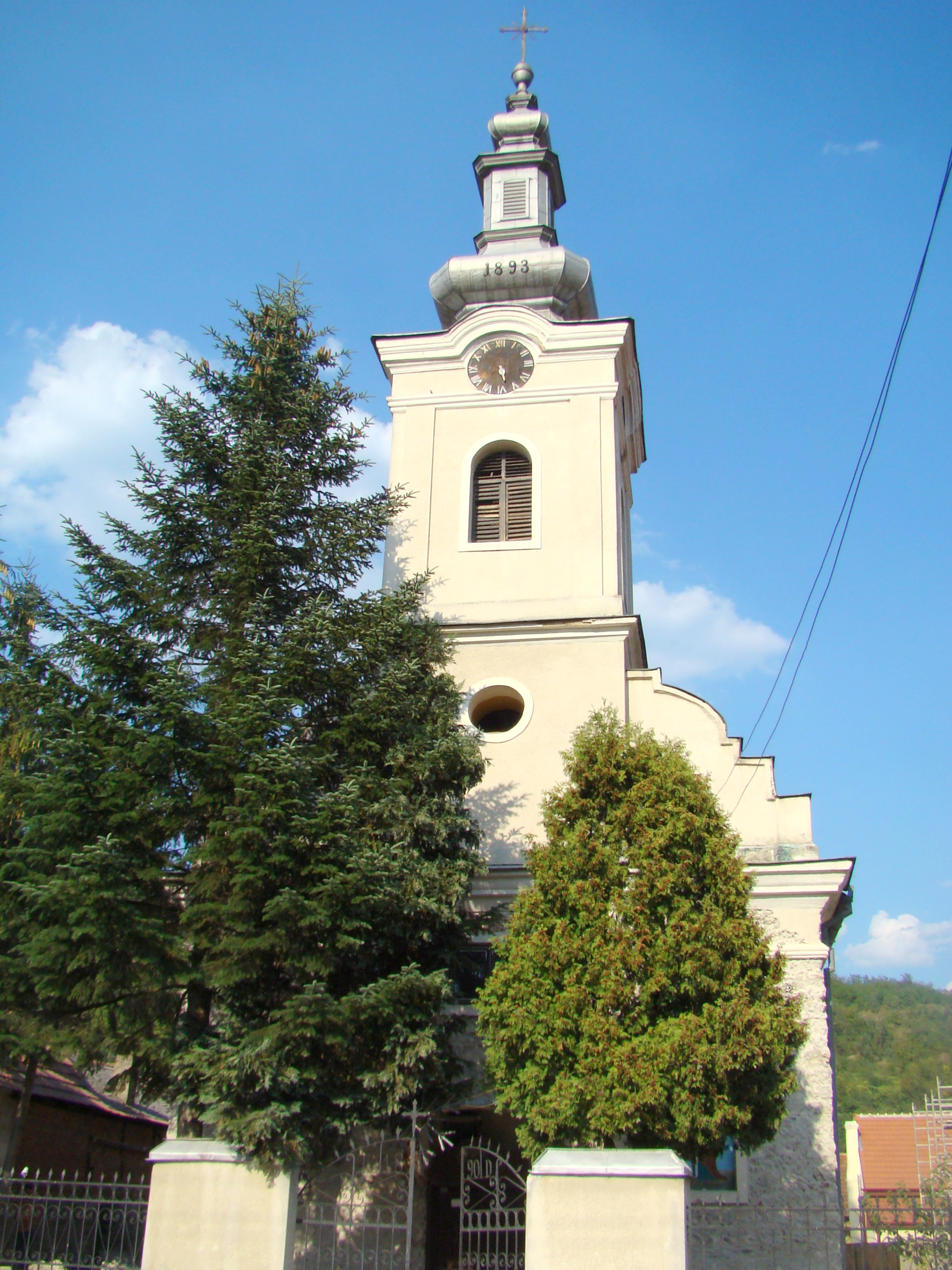 Biserica „Sf. Ioan Botezătorul”, sat Iablanița; comuna Iablanița